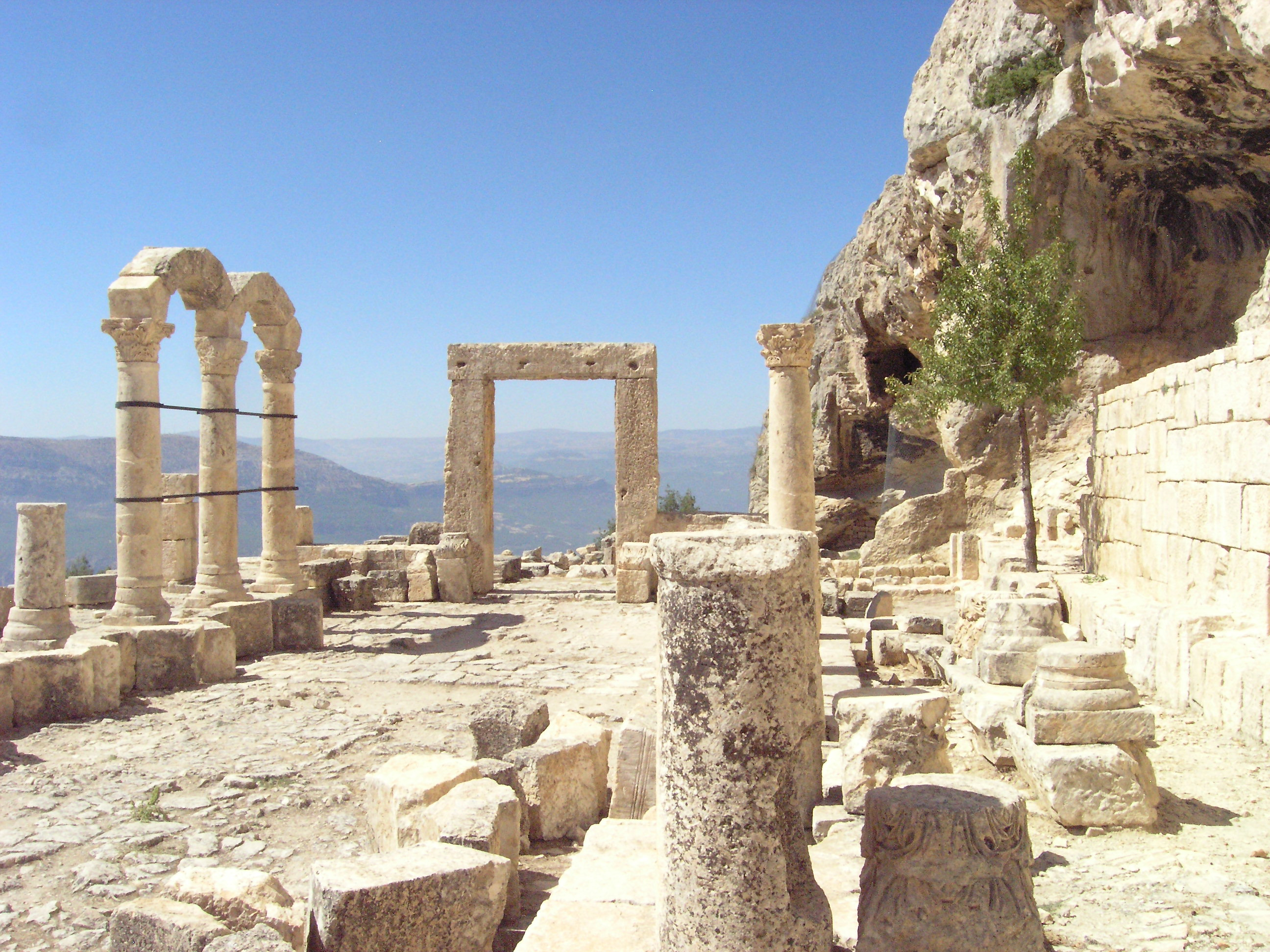 Alahan "Kloster", frühbyzantinische Pilgeranlage in der Türkei (Provinz Mersin), Westbasilika